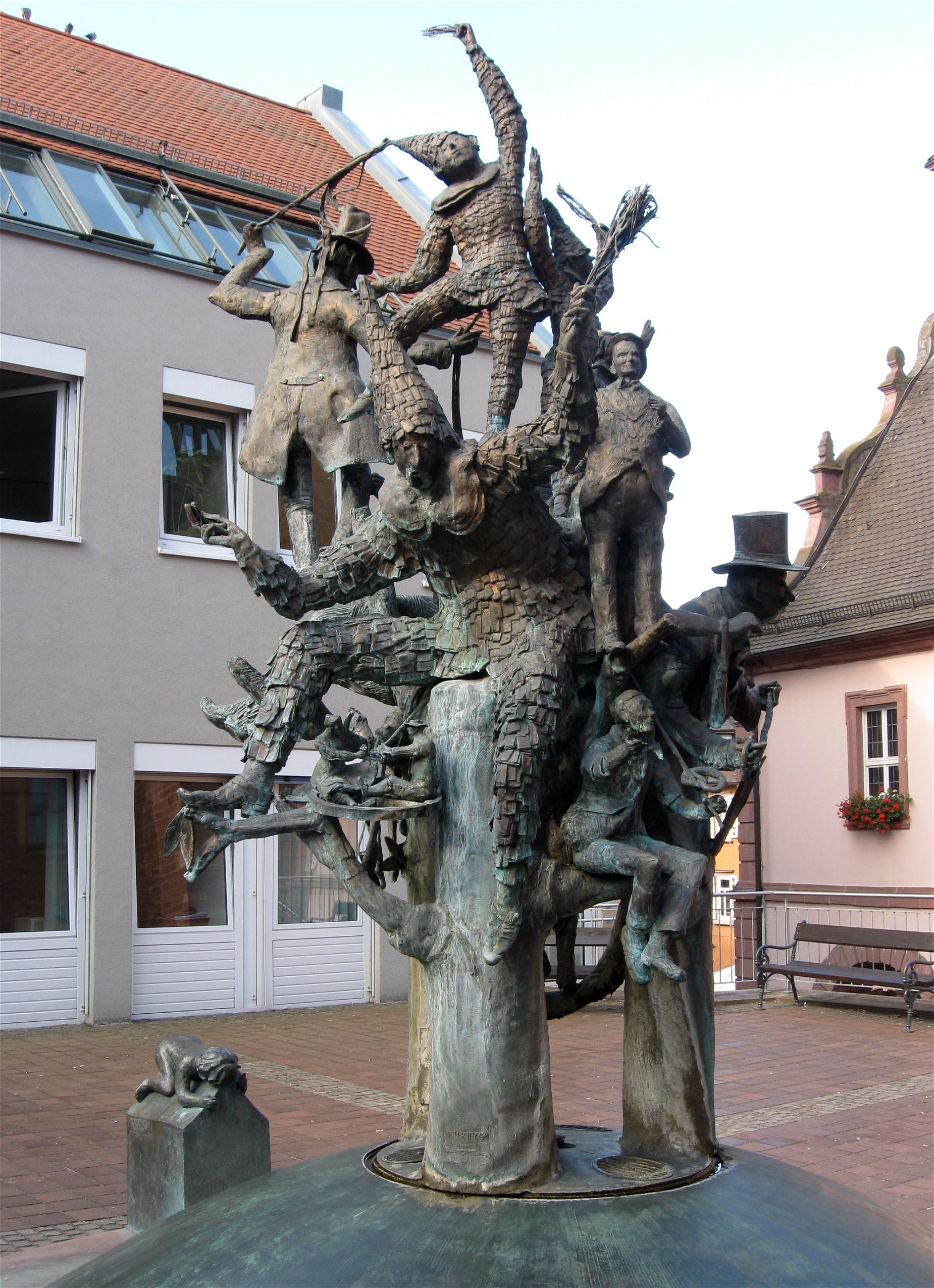 Narrenbrunnen in Buchen (Odenwald)